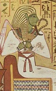 Wächter der Toten und der Unterwelt: Osiris